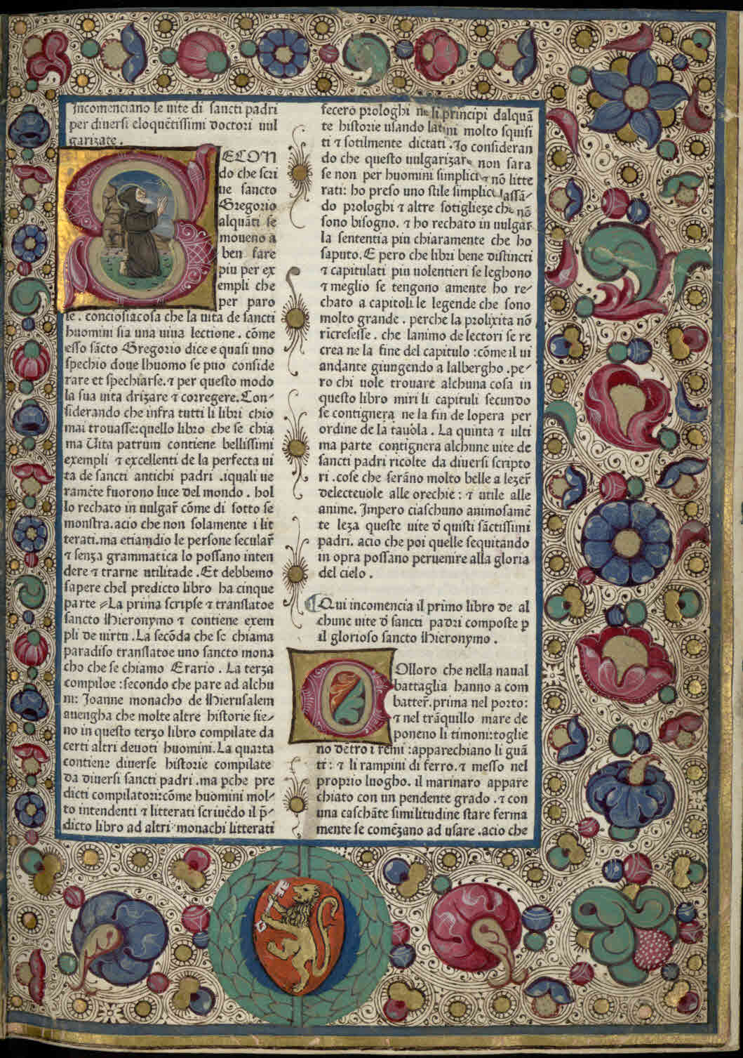 Vitas patrum (italiano). - [Venezia] : [Gabriele di Pietro], [non dopo il 1474]. - 272 c. ; [a-z¹⁰, A-D¹⁰] ; fol. - IGI attribuiva originariamente la stampa a Cristoforo Arnoldi, 1480. - Iniziali figurate e cornice miniata a motivi fitomorfi su foglia d'oro e stemma nel bas de page a c. [a]2r. - Mancano le cc. [a]1 e [D]9-10 (bianche) .